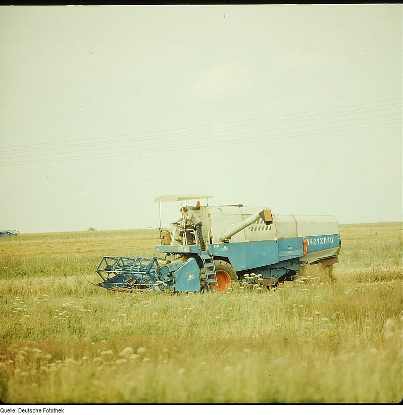 Original image description from the Deutsche FotothekMähdrescher